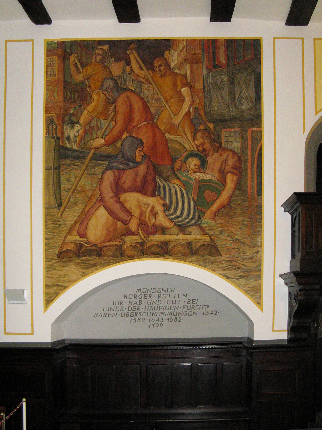 Überschwemmungsbild im Rathaus von Hannoversch Münden